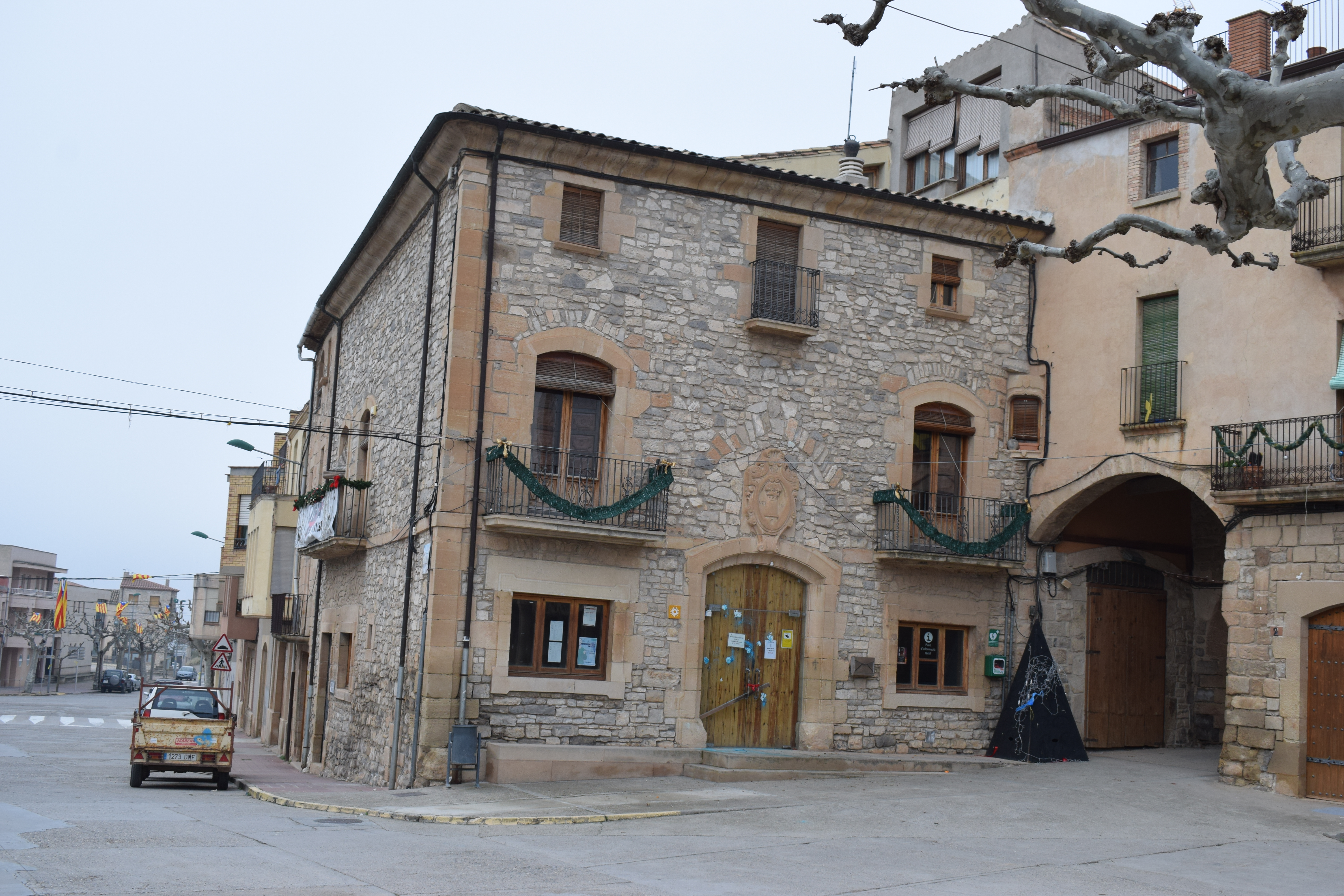 Edifici d'estil barroc classicista construït al segle XVIII.